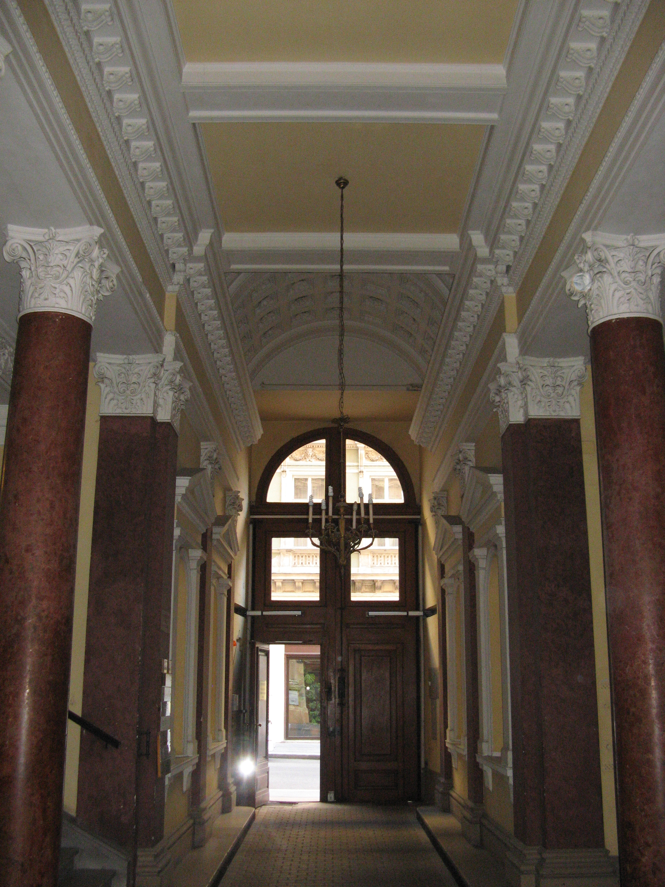 Foyer, Elisabethstraße 15 (1872) von Wilhelm Stiassny, Wien-Innere Stadt